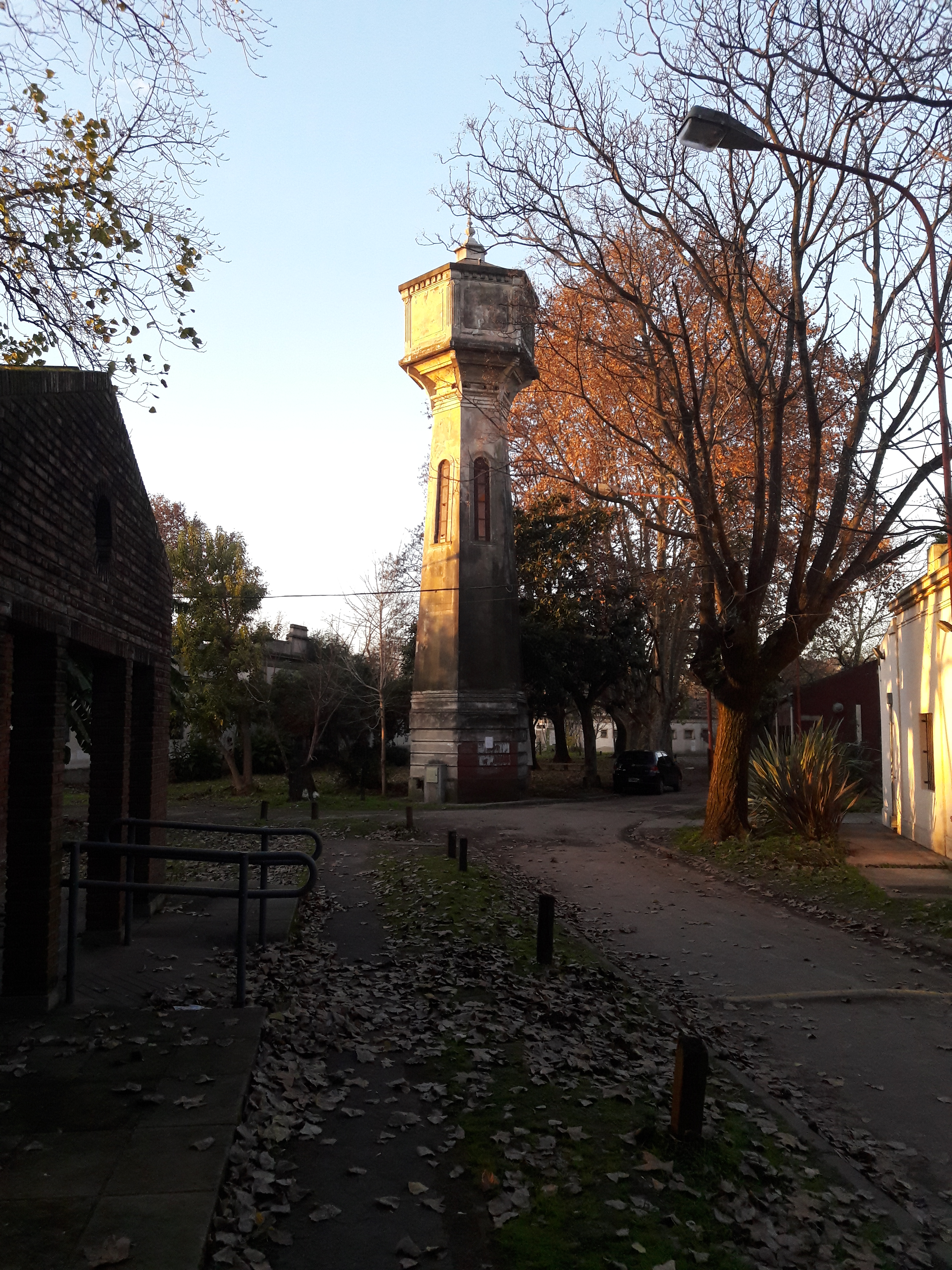 En una tarde otoñal